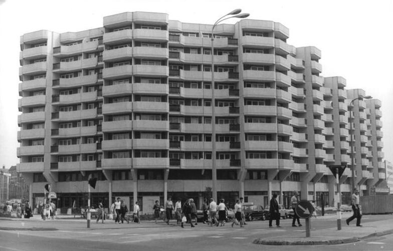 ADN-ZB-Settnik-21.9.85.hko- Berlin: Mit der Fertigstellung der letzten 56 Wohnungen Ende September findet der Baukomplex am Berliner Spittelmarkt zwischen Wall- und Seydelstraße seinen Abschluß. Dieser Block bildet den Anschluß an die Altbebauung der Wallstraße. (Siehe auch /2N)